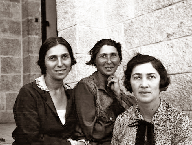 האחיות לבית הכהן, בנות מרדכי בן הלל ושפרה בתיה. מימין לשמאל: דינה הכהן, רוזה גינוסר שהייתה עורכת הדין הראשונה בא"י (רעייתו של שלמה גינוסר - גינצברג, בנו של אחד העם), חנה רופין, 14/4/1928